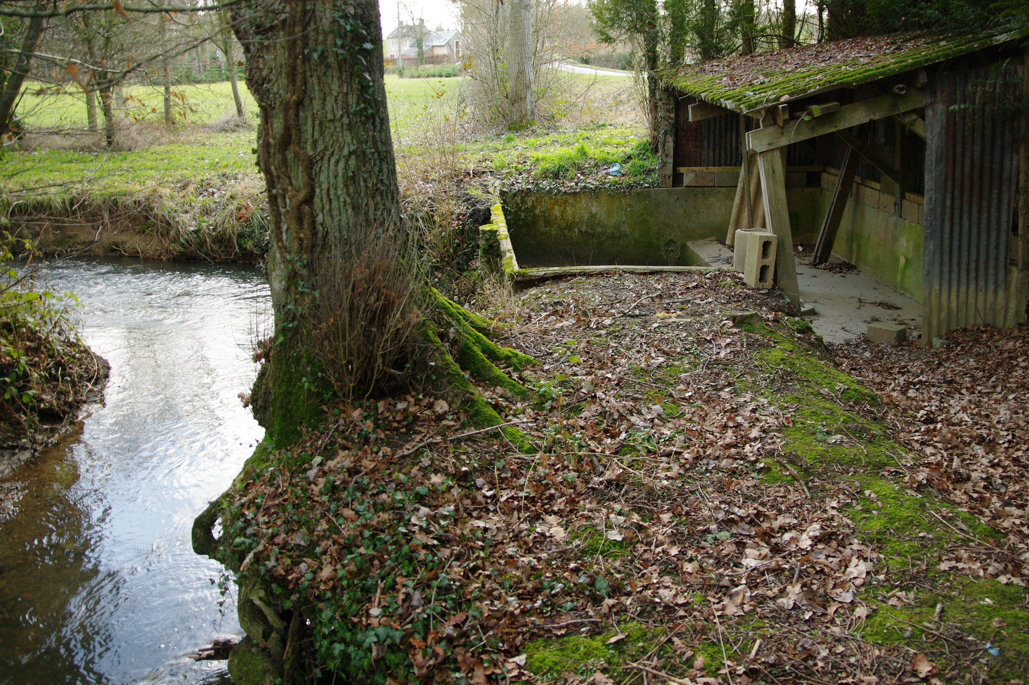 Lavoir sur la rivière Laize, lieu-dit "Clair Tison", commune de Tournebu, Calvados.